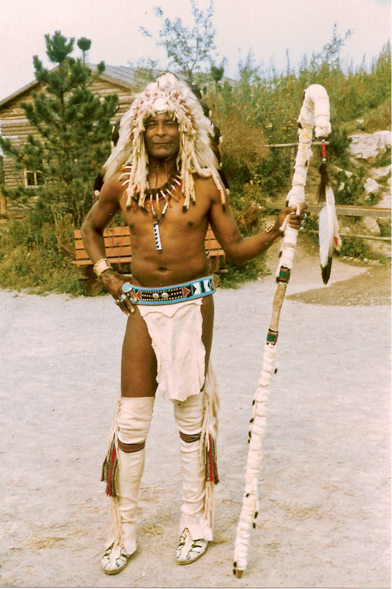 "Nicki" Buffalo Child in traditioneller Stammeskleidung (Nichols gehört zu den Stämmen der Cherokee und Choctaw). Silkirtis Nichols, (bekannt unter seinem indianischen Namen Buffalo Child, * 23. Juni 1923 in Denver, Colorado, USA) ist ein indianischer Schauspieler.